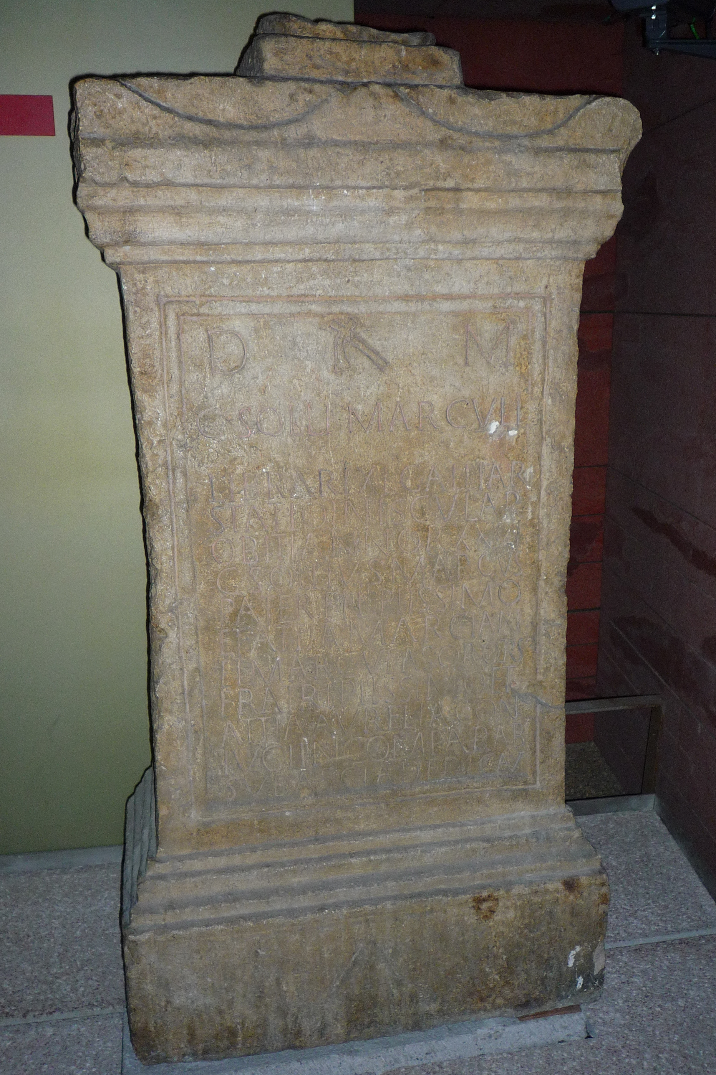 Cippe funéraire de Caius Sollius Marculus, librarius (comptable) du 40eme des Gaules, IIe siècle, Musée de l'ancien évêché - Grenoble. Il s'agit de l'épitaphe de Marculus, mort à 26 ans. L'inscription fut réalisée par son père, ses soeurs et sa femme, elle porte la formule funéraire "sub ascia dedicav(erunt)". Référence de l'inscription : CIL XII, 2252 ; Inscription latine de la Gaule Narbonnaise, Vienne, t.2, n°388